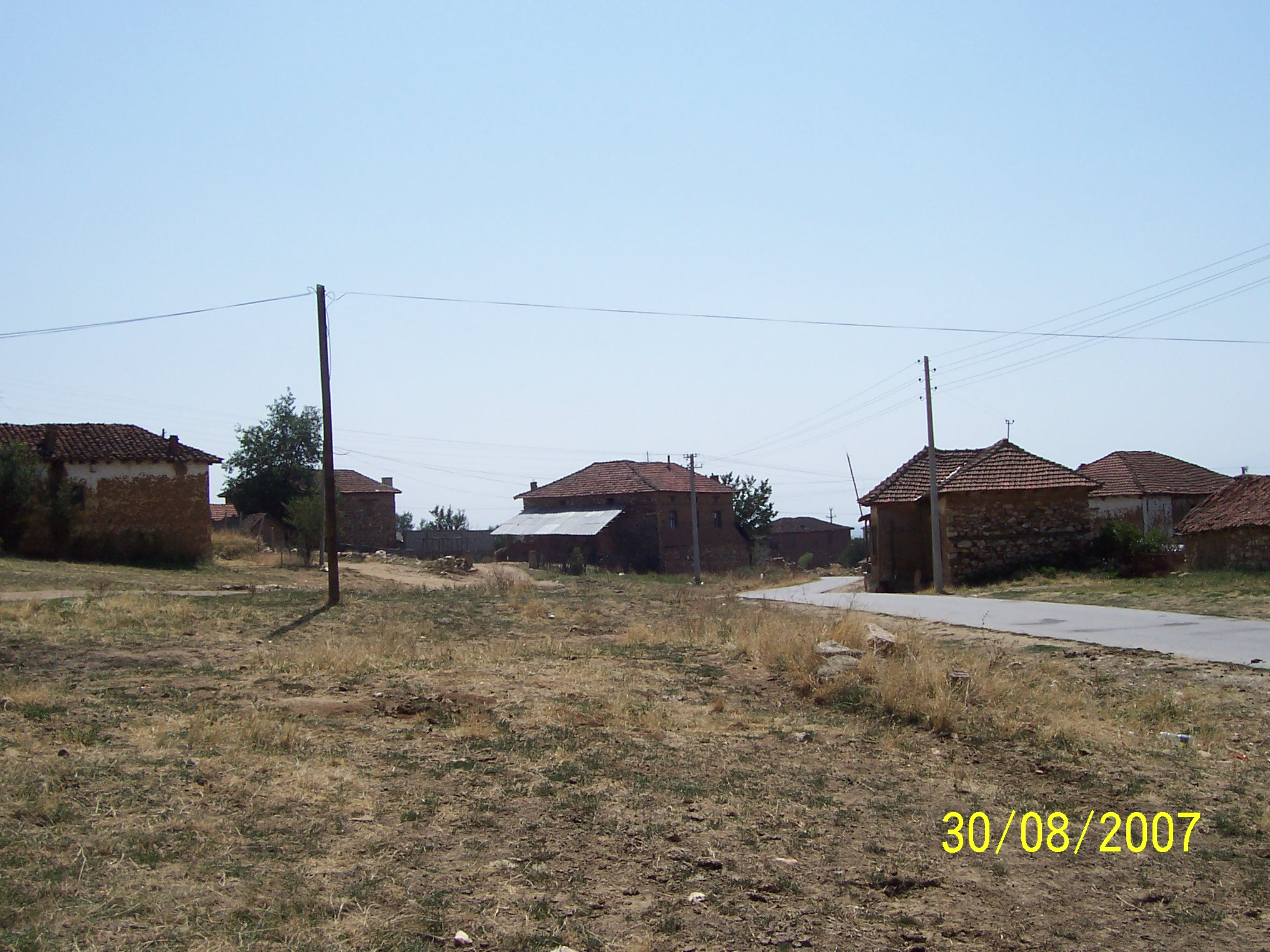 Слепче, прилепско